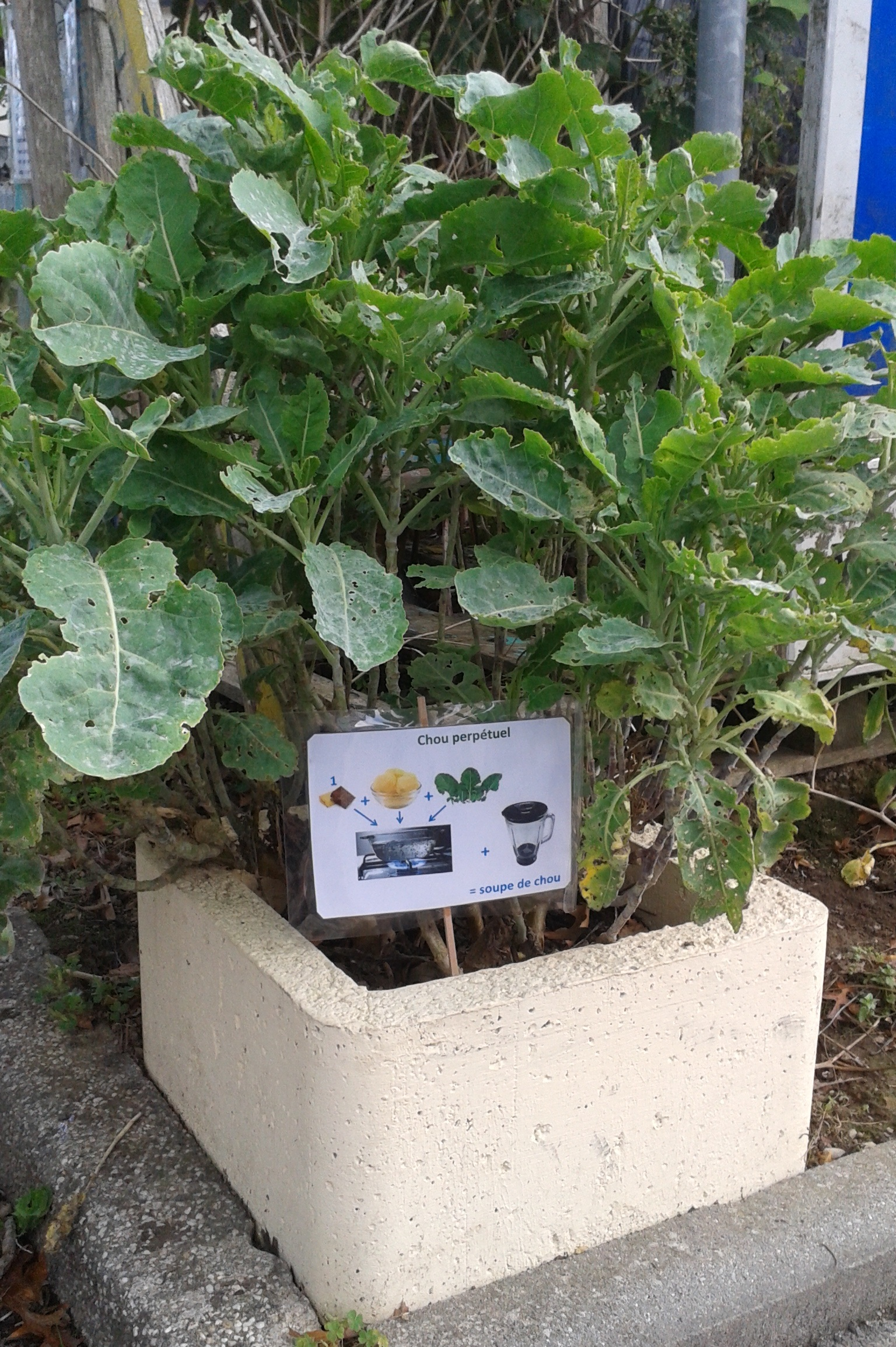 Chou perpétuel bien installé aux Incroyables Jardins de Laillé, avec une affiche-recette à l'attention des promeneurs-cueilleurs.